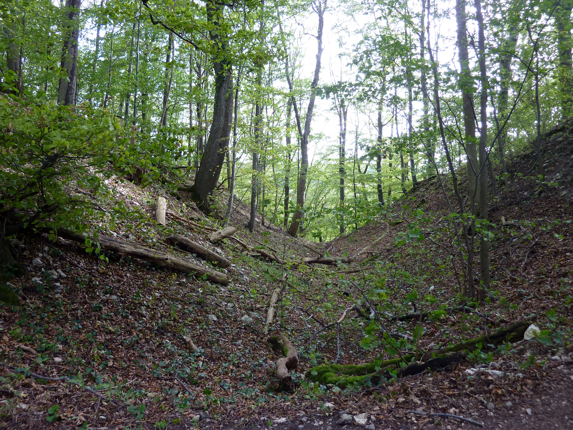 Bertaburg auf dem Kornberg oberhalb von Bad Boll